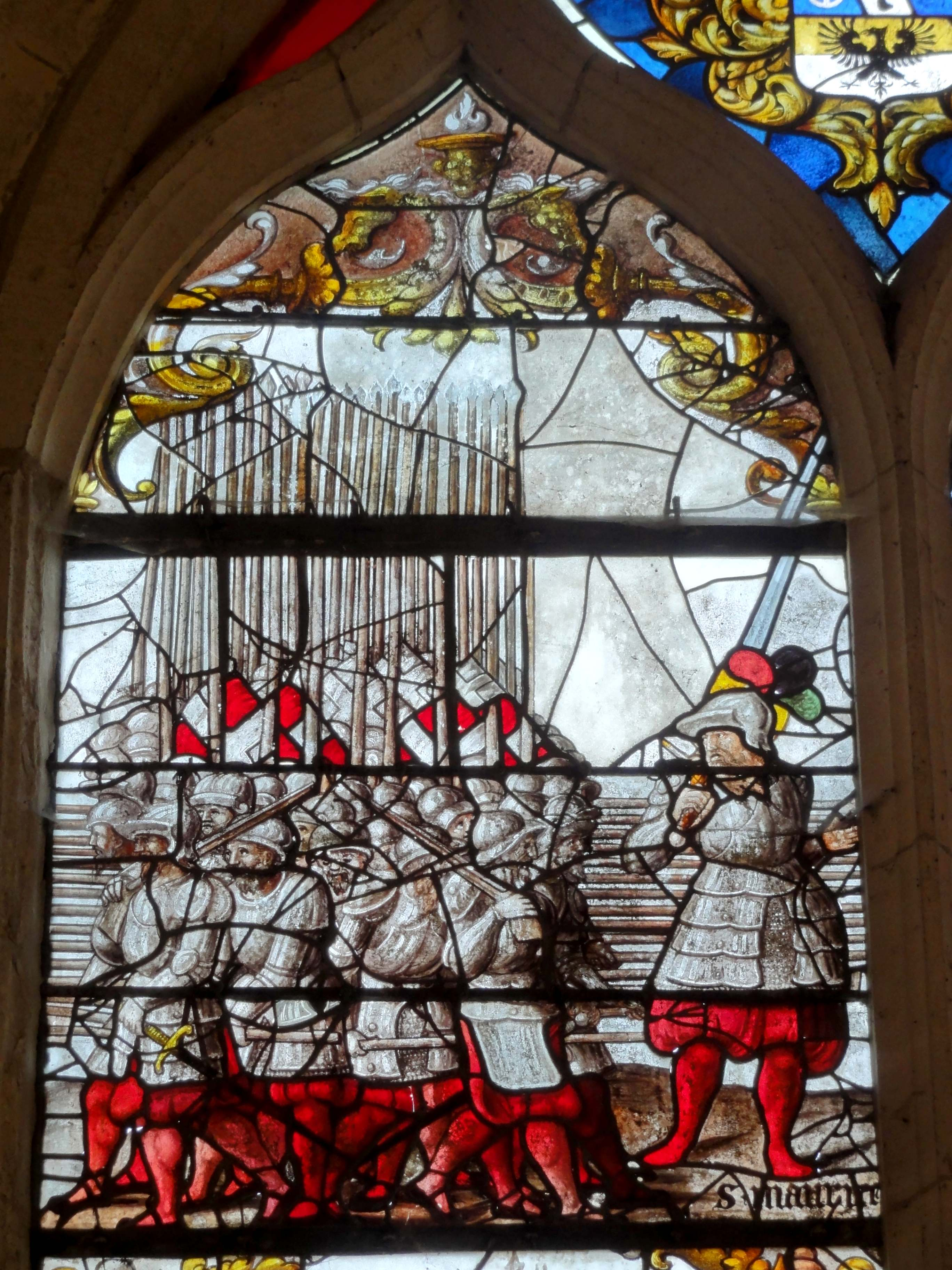 Verrière hagiographique n° 1, classée comme verrière n° 3.